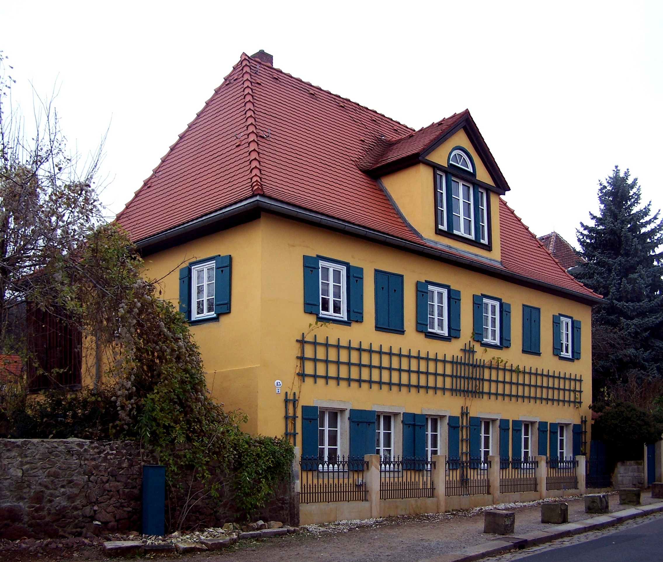 Haus Rotzsche (Bennostr. 15) in Radebeul